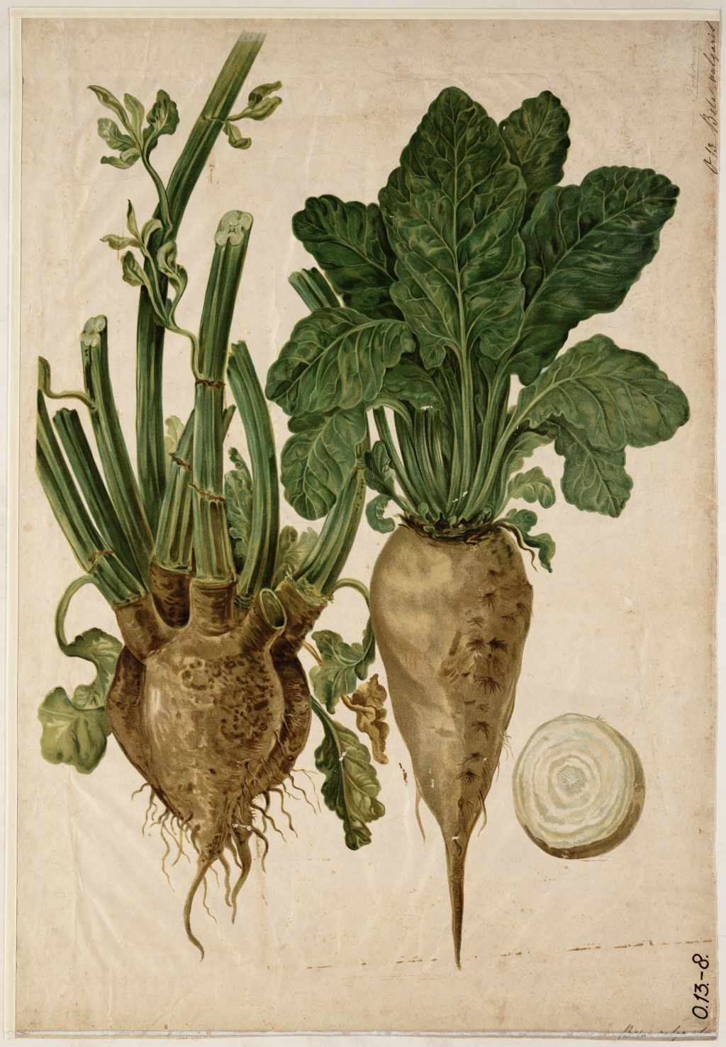 A. Pokorny, ‘Beta vulgaris’, botanische wandplaat eind 19de eeuw.